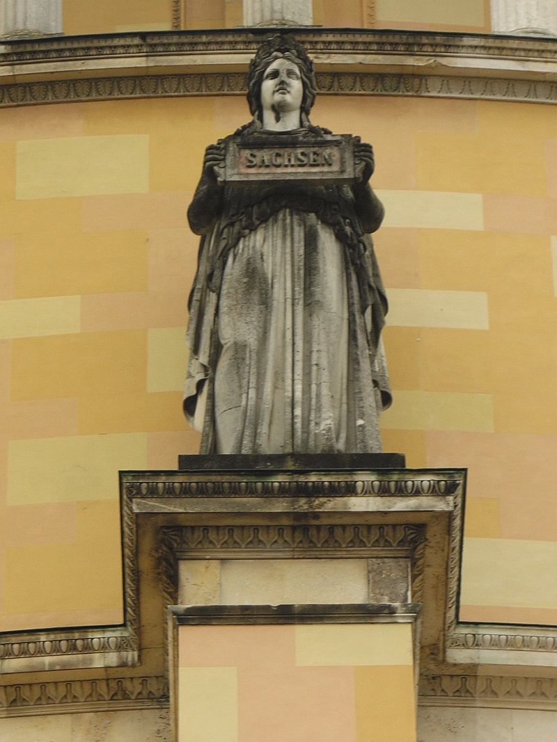 Diese Statue an der Aussenseite der Befreiungshalle in Kelheim steht für den Volksstamm der Sachsen, Höhe der Statue 580 cm. Sie ist eine von 18 Statuen, die nach Modellen des Bildhauers Johann Halbig geschaffen wurden.